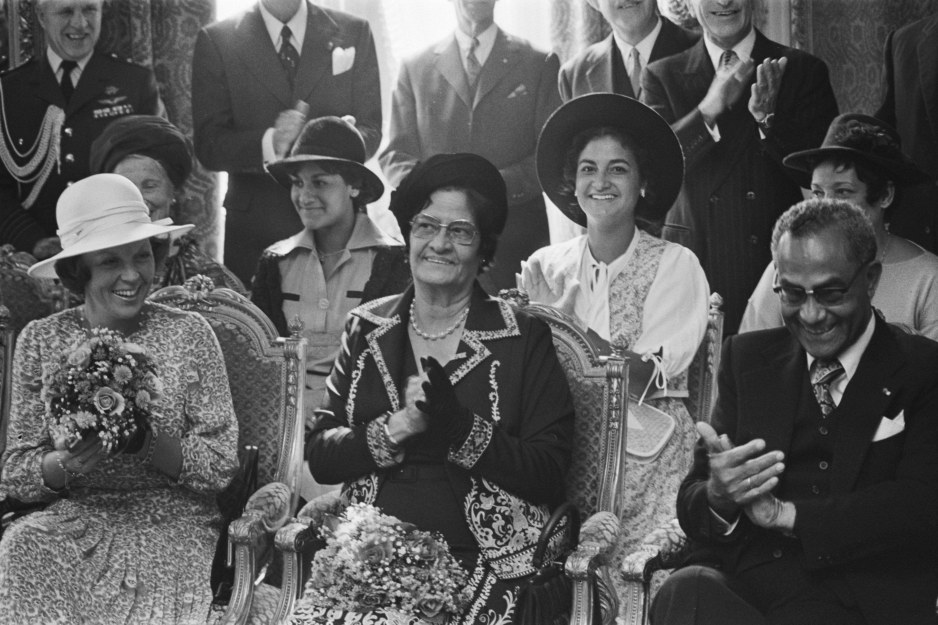 Collectie / Archief : Fotocollectie Anefo Reportage / Serie : [ onbekend ] Beschrijving : Staatsbezoek Surinaamse preident. Ferrier ; ontvangst ambtswoning burgemeester Polak, v.l.n.r. Beatrix, mevr. Ferrier, Ferrier, achter hen dochters Joan, Kathleen en Cynthia? Datum : 14 september 1977 Locatie : Amsterdam, Noord-Holland Trefwoorden : koninginnen, presidenten, staatsbezoeken Persoonsnaam : Beatrix (prinses Nederland), Ferrier, Johan, Juliana (koningin Nederland) Fotograaf : Verhoeff, Bert / Anefo Auteursrechthebbende : Nationaal Archief Materiaalsoort : Negatief (zwart/wit) Nummer archiefinventaris : bekijk toegang 2.24.01.05 Bestanddeelnummer : 929-3463